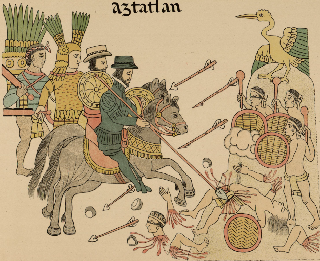 Fragmento del Lienzo de Tlaxcala.